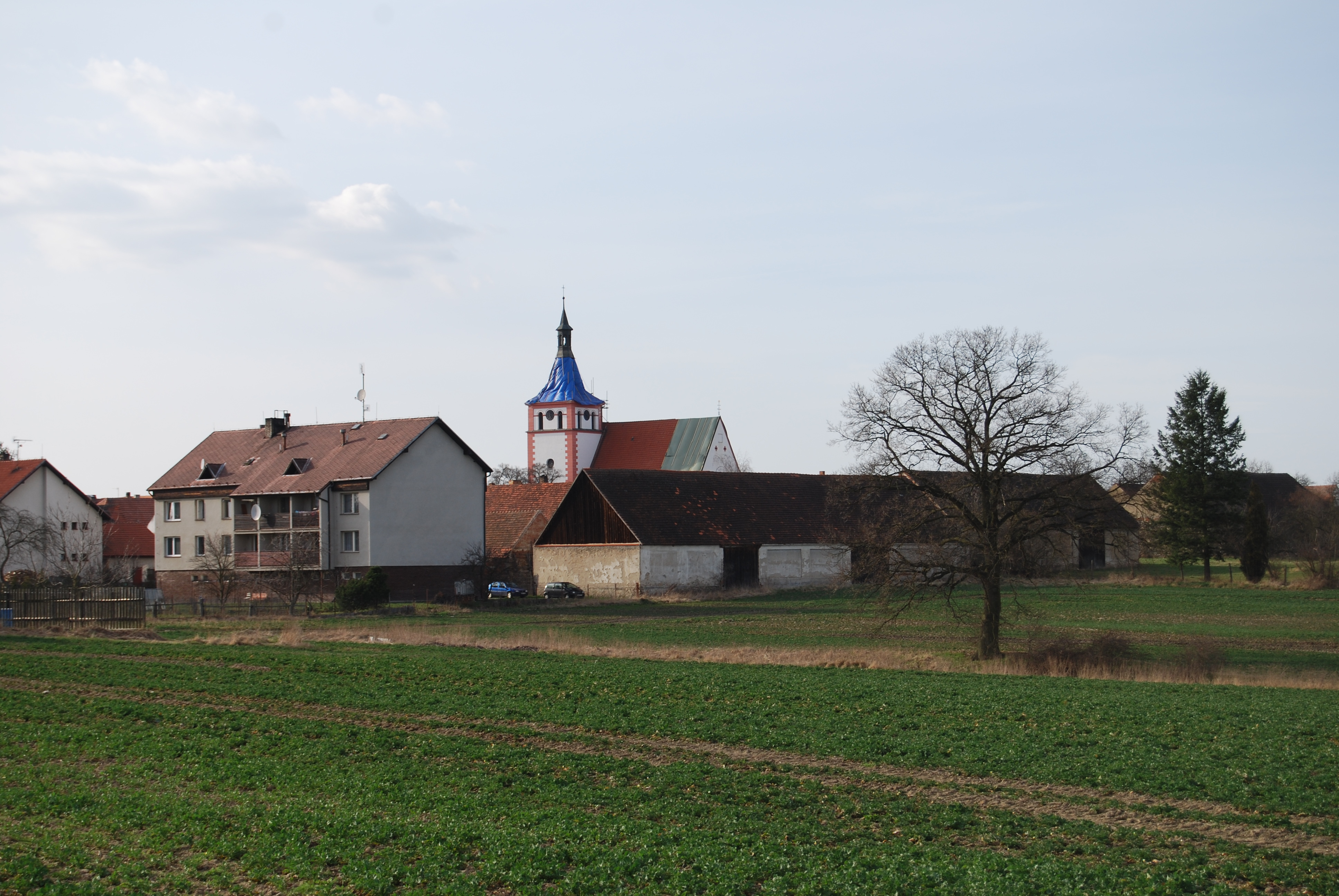 Pohled na obec .Oslov. Okres Písek. Česká republika.